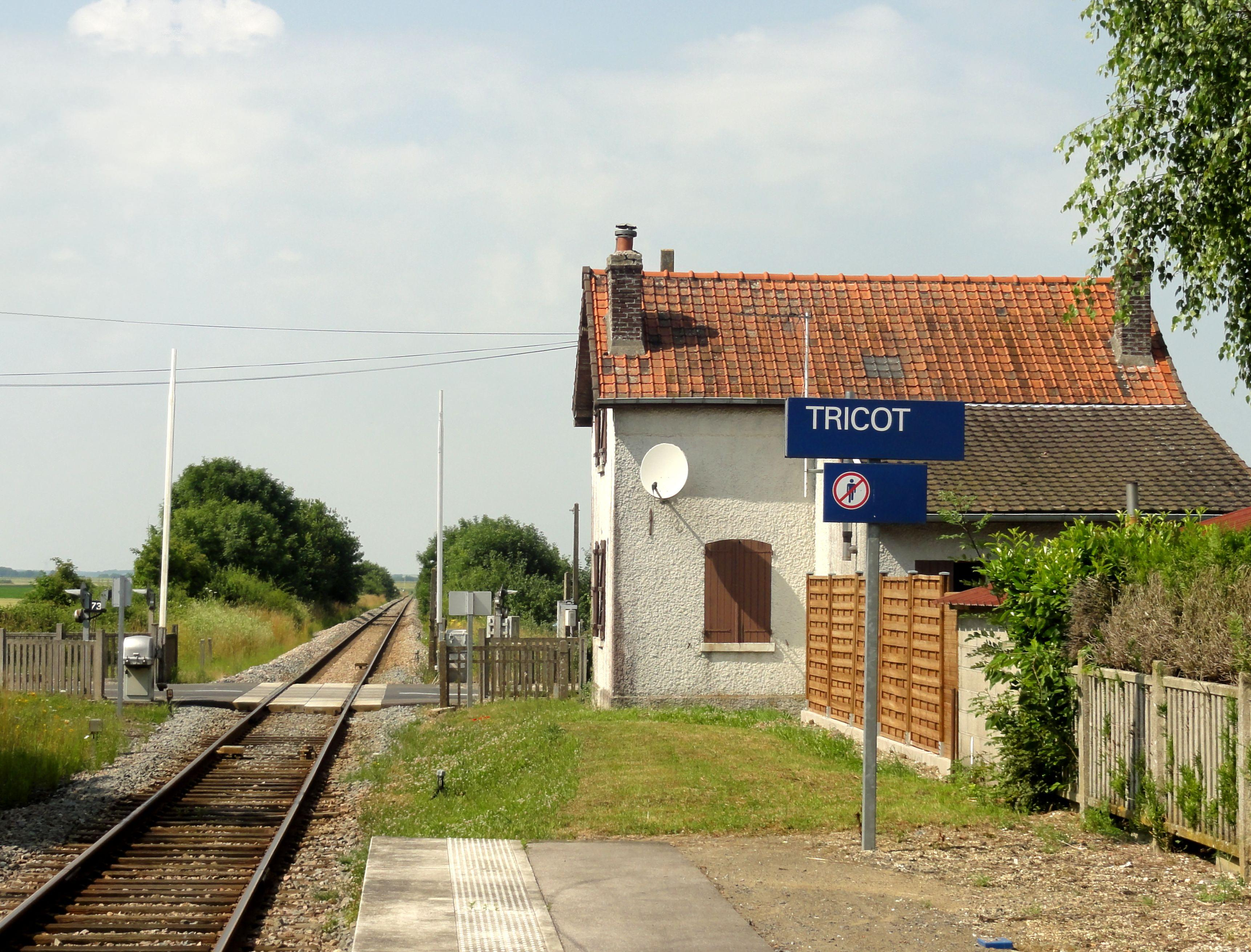 Arrêt SNCF et passage à niveau.